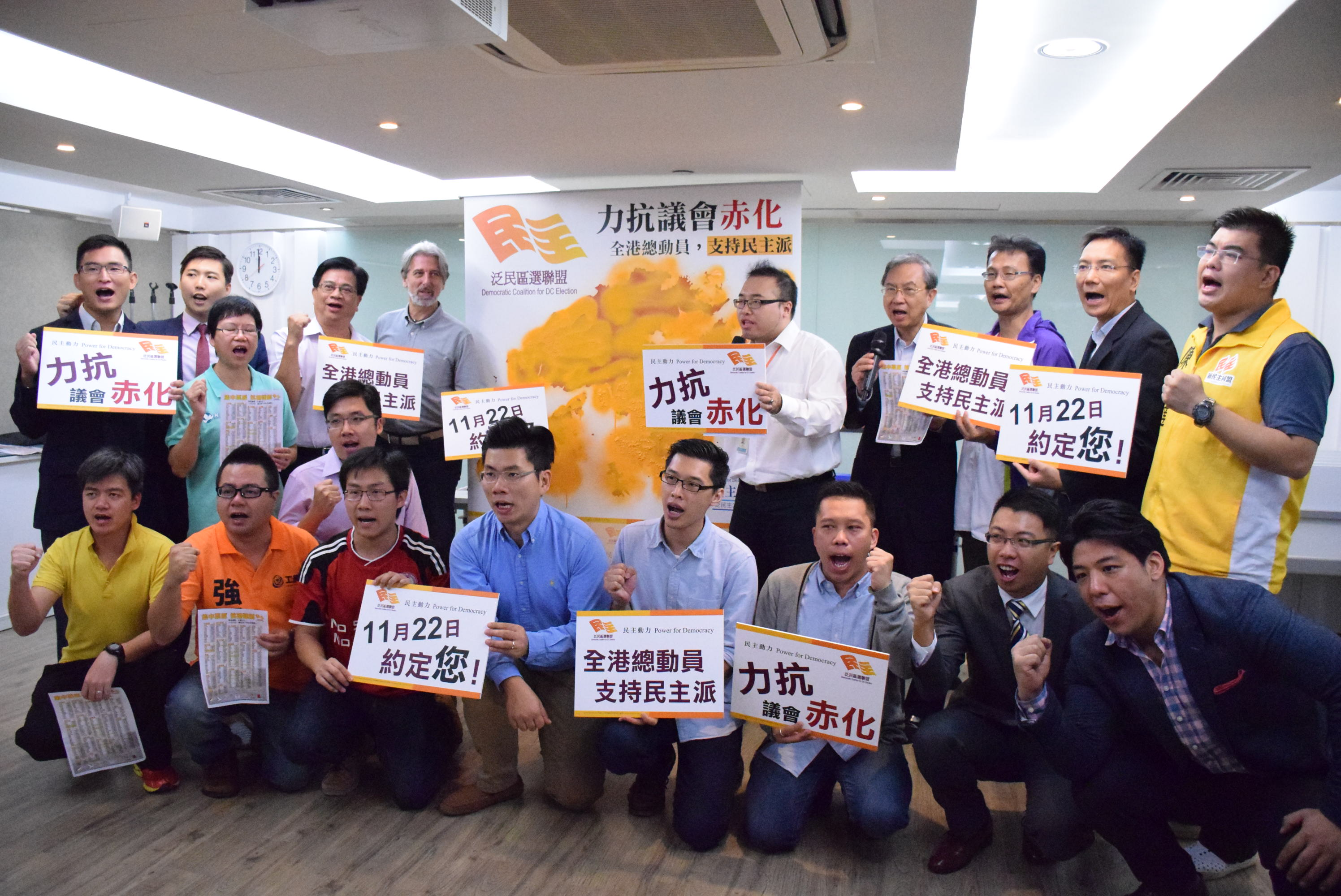 中文（香港）: 香港民主動力以「力抗議會赤化」作為區議會選舉口號 (美國之音 湯惠芸拍攝)